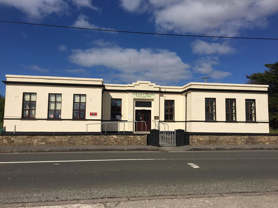 os comhair an choláiste i loch an Iúir